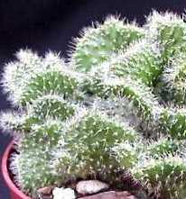 Opuntia cristata